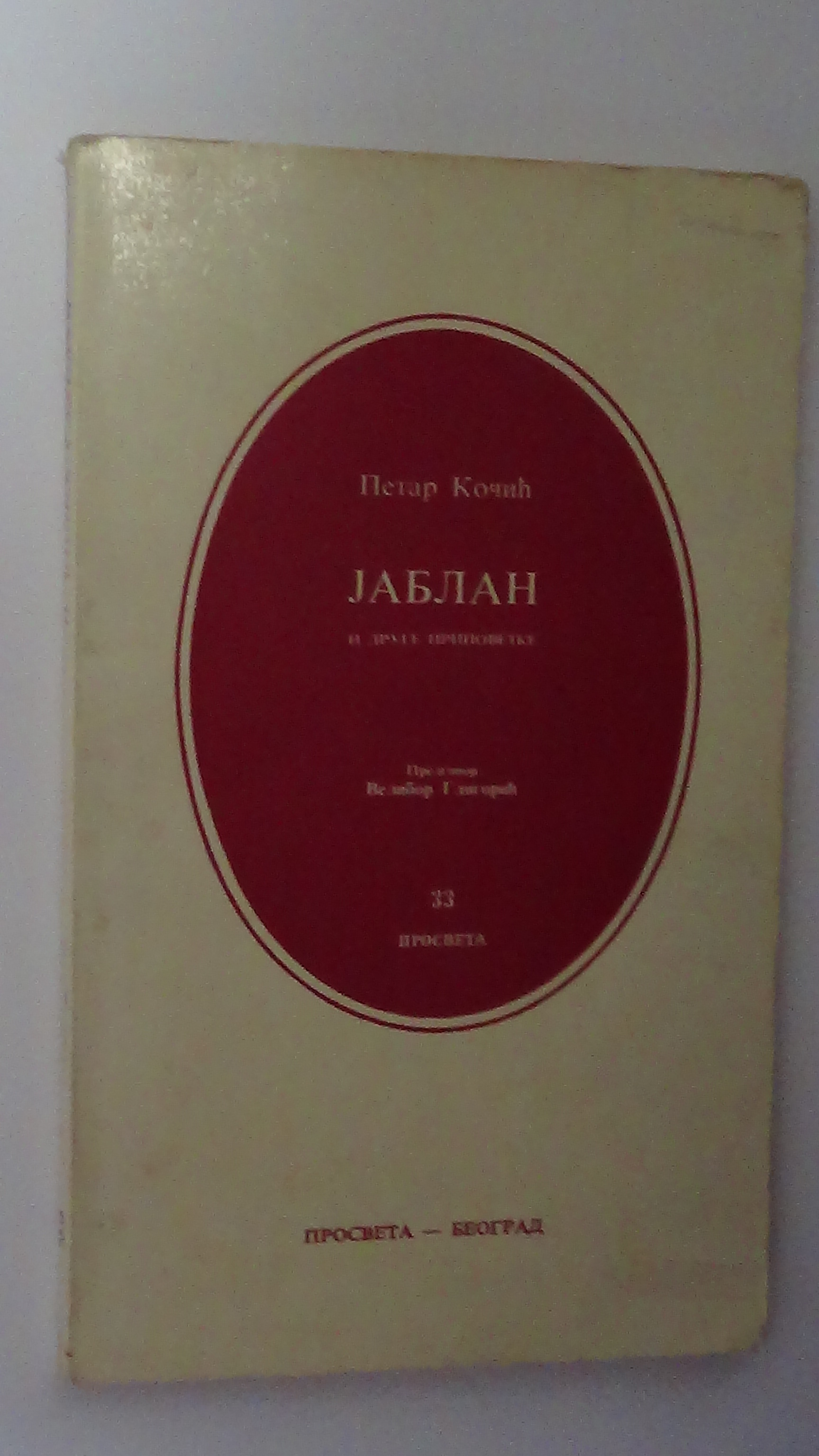 „Јаблан и други раскази“, Просвета, Белград, 1971.